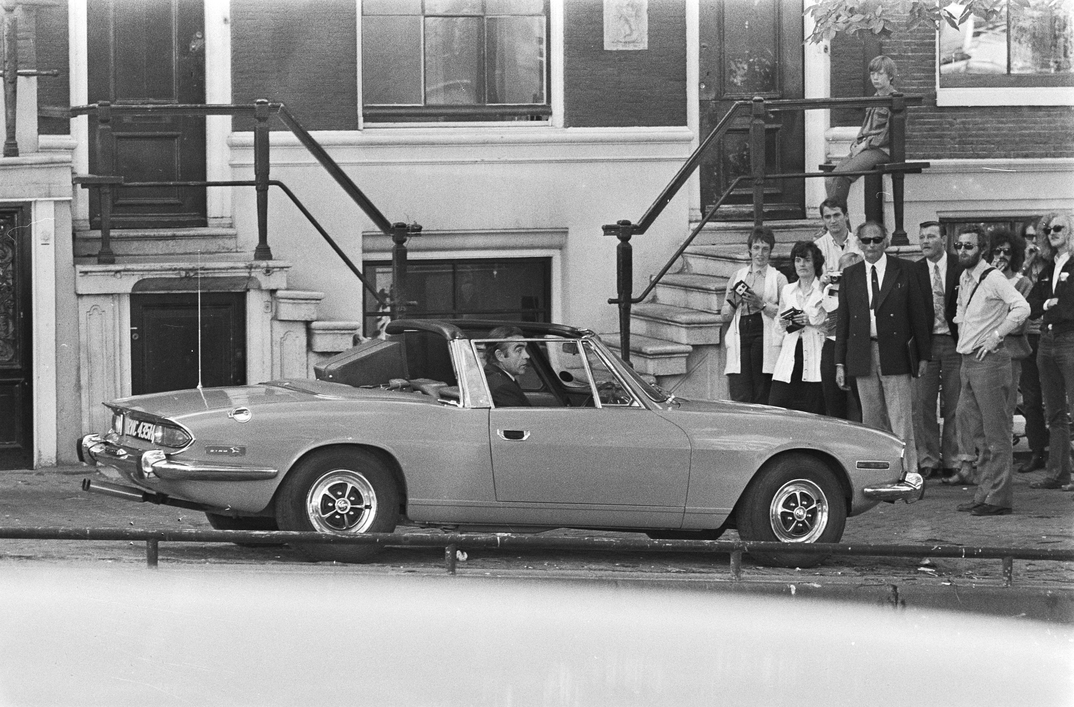 Collectie / Archief : Fotocollectie Anefo Reportage / Serie : [ onbekend ] Beschrijving : Opnamen in Amsterdam voor James Bond film "Diamonds are Forever", Sean Connery als James Bond in auto op Reguliersgracht Datum : 3 juli 1971 Locatie : Amsterdam, Noord-Holland Trefwoorden : acteurs, auto's, films, filmsterren Persoonsnaam : Connery Sean Fotograaf : Mieremet, Rob / Anefo Auteursrechthebbende : Nationaal Archief Materiaalsoort : Negatief (zwart/wit) Nummer archiefinventaris : bekijk toegang 2.24.01.05 Bestanddeelnummer : 924-7002 Reacties Geplaatst door Maaike op 19 september 2012 - 17:36. James Bond in zijn Aston Martin - ook wel de Bond-auto genoemd.